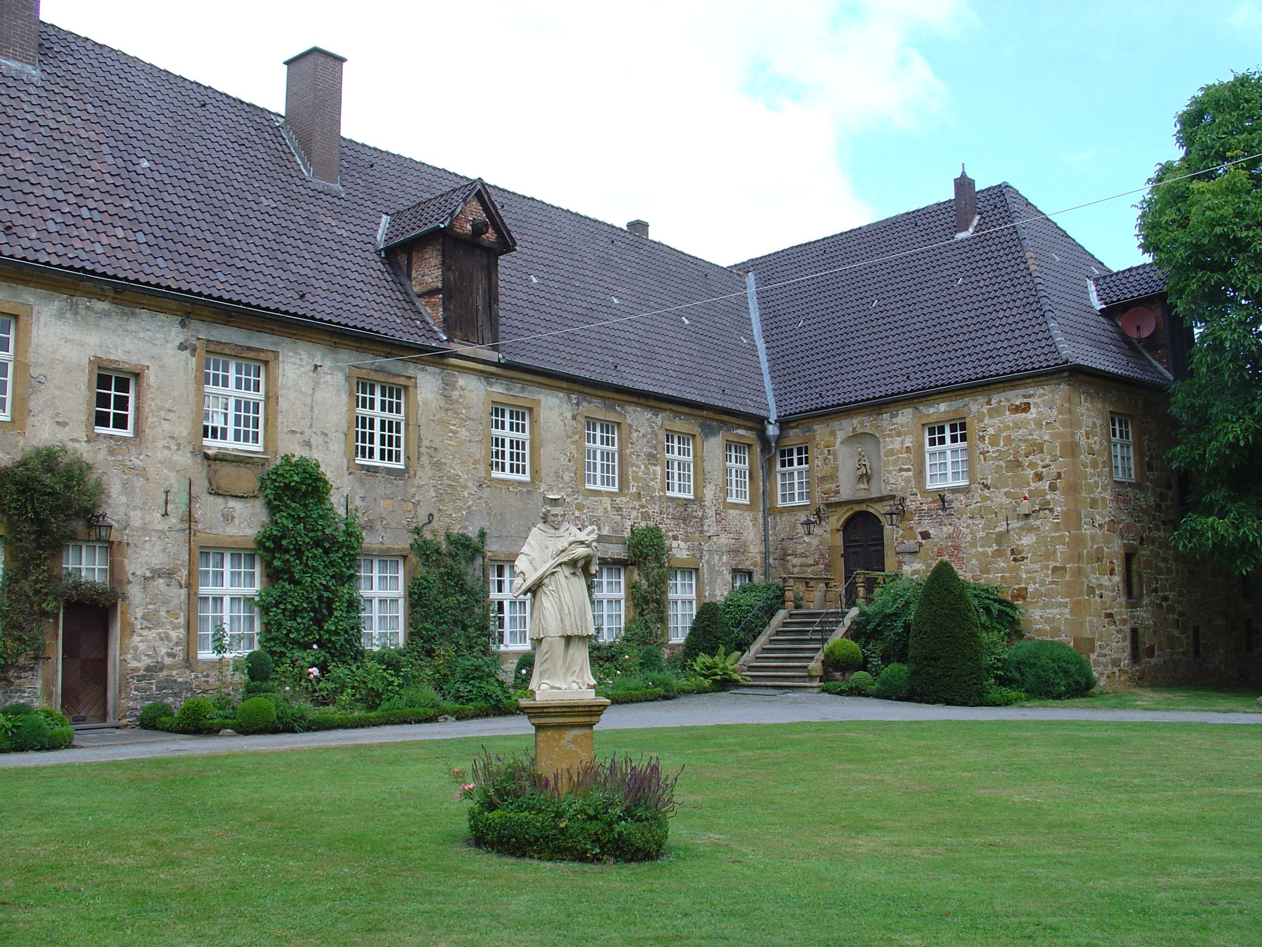 Konventshaus und Dormitorium des Benediktinerinnenklosters Herzebrock